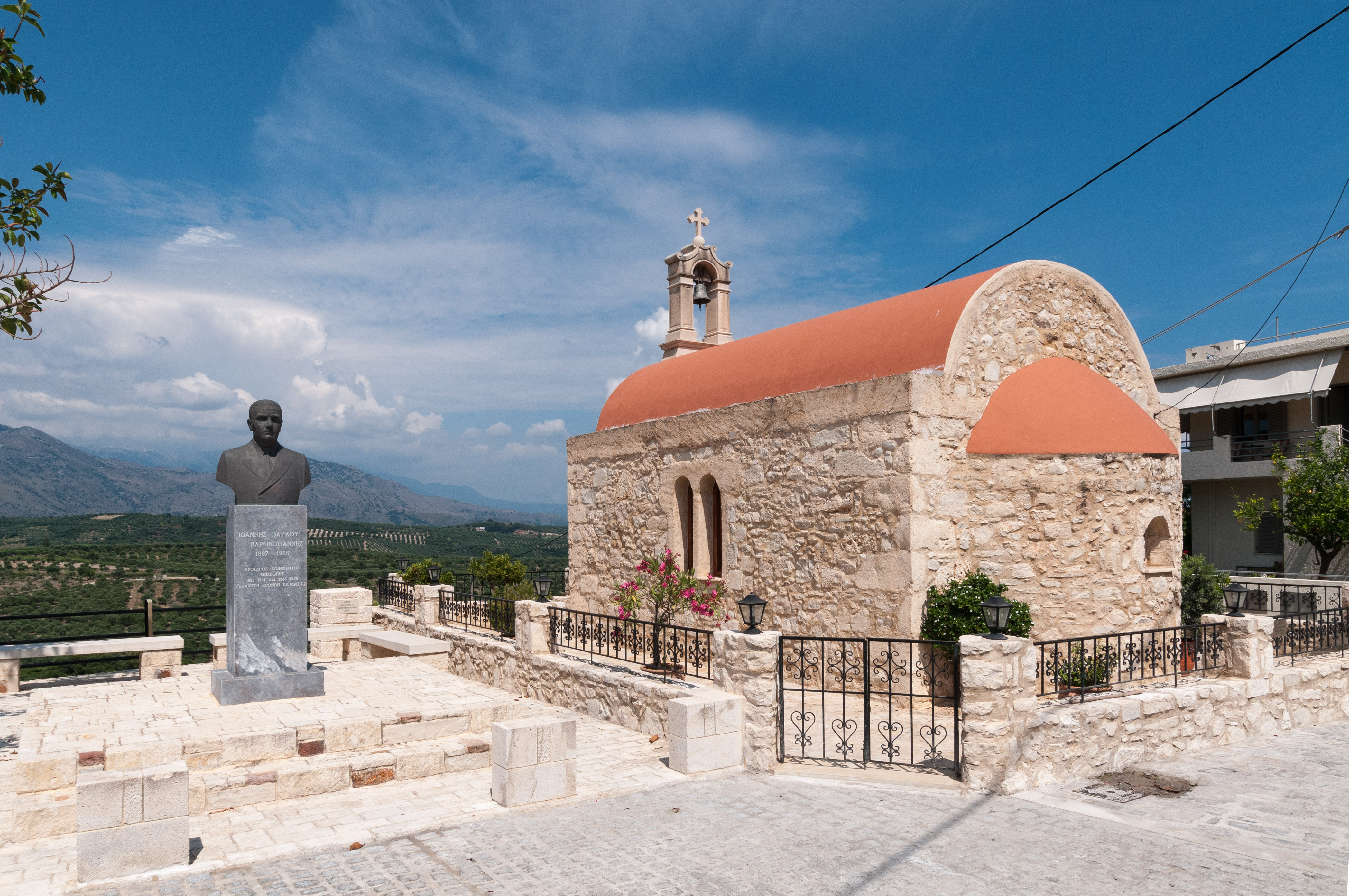 Episkopi, wieś w regionie Rethymno. Kaplica i pomnik.